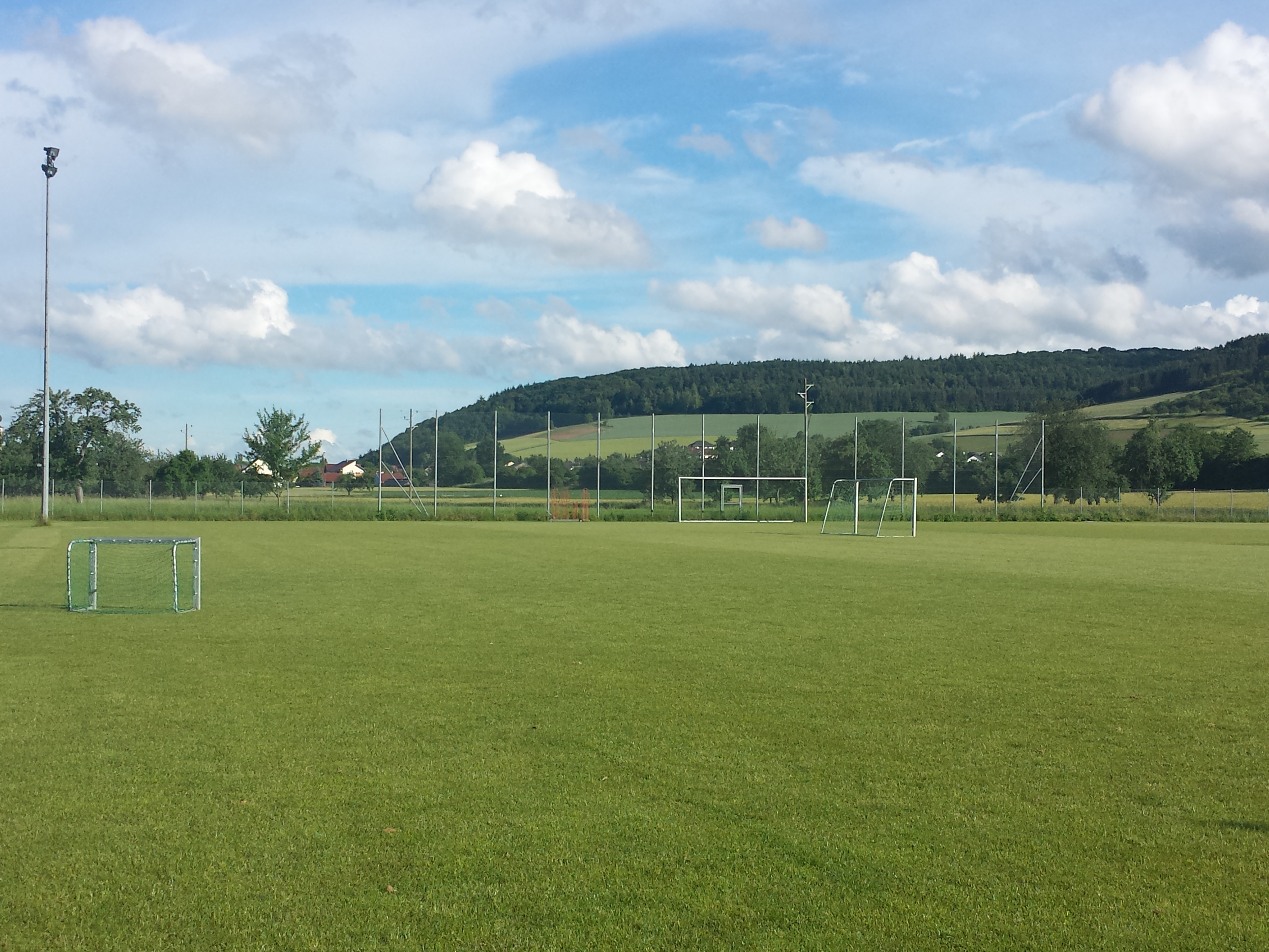 Blick auf einen Trainingsplatz des TSV Tauberbischofsheim. Der Trainingsplatz liegt am Taubertalradweg von Tauberbischofsheim nach Dittigheim.